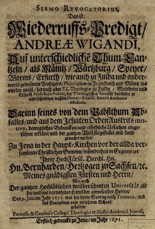 Titelblatt der "Wiederruffs-Predigt" Andreas Wigands in der Jenaer St.-Michaels-Kirche, in der er seine Konversion begründete